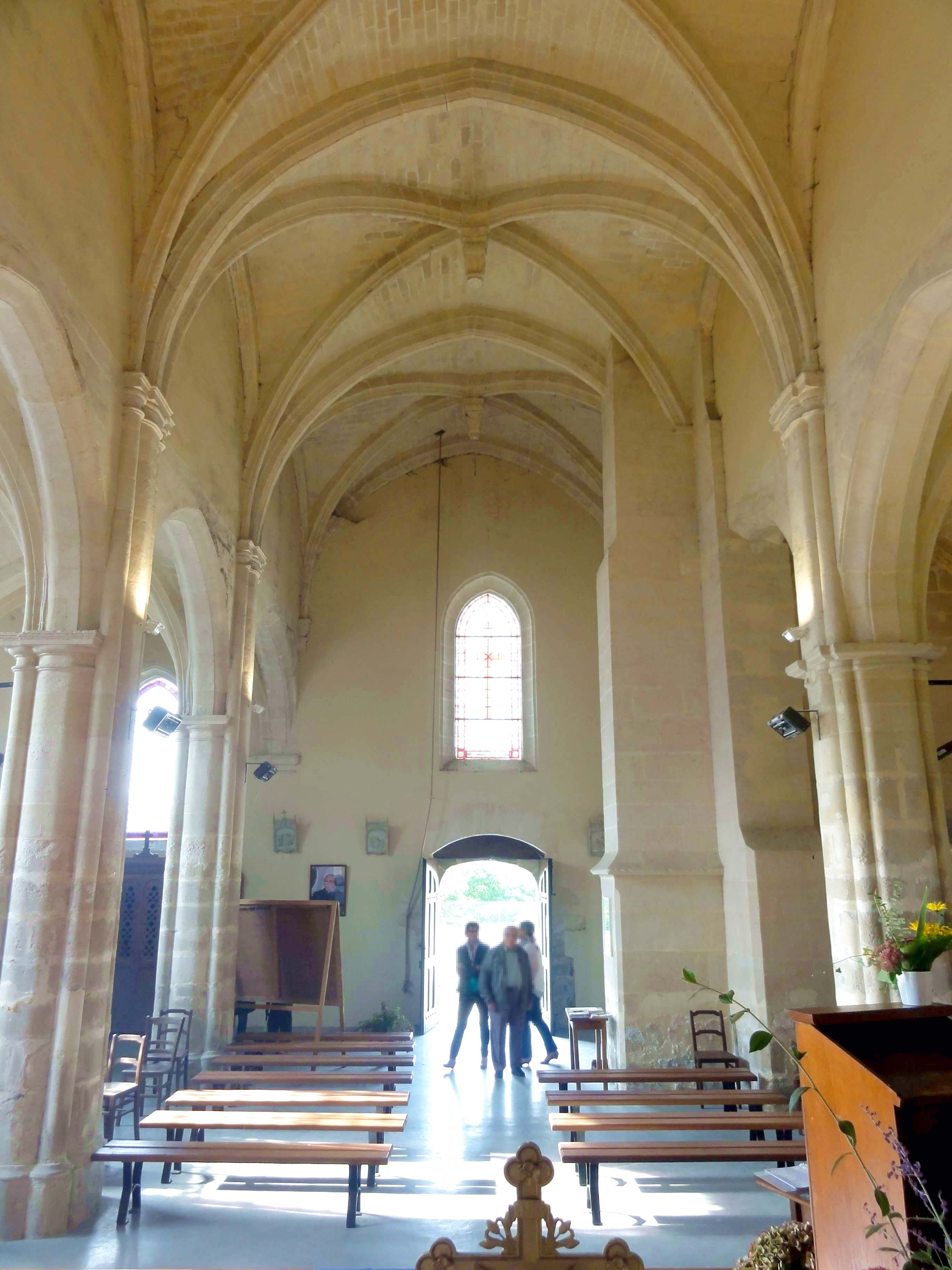 Intérieur de l'église - voir titre.